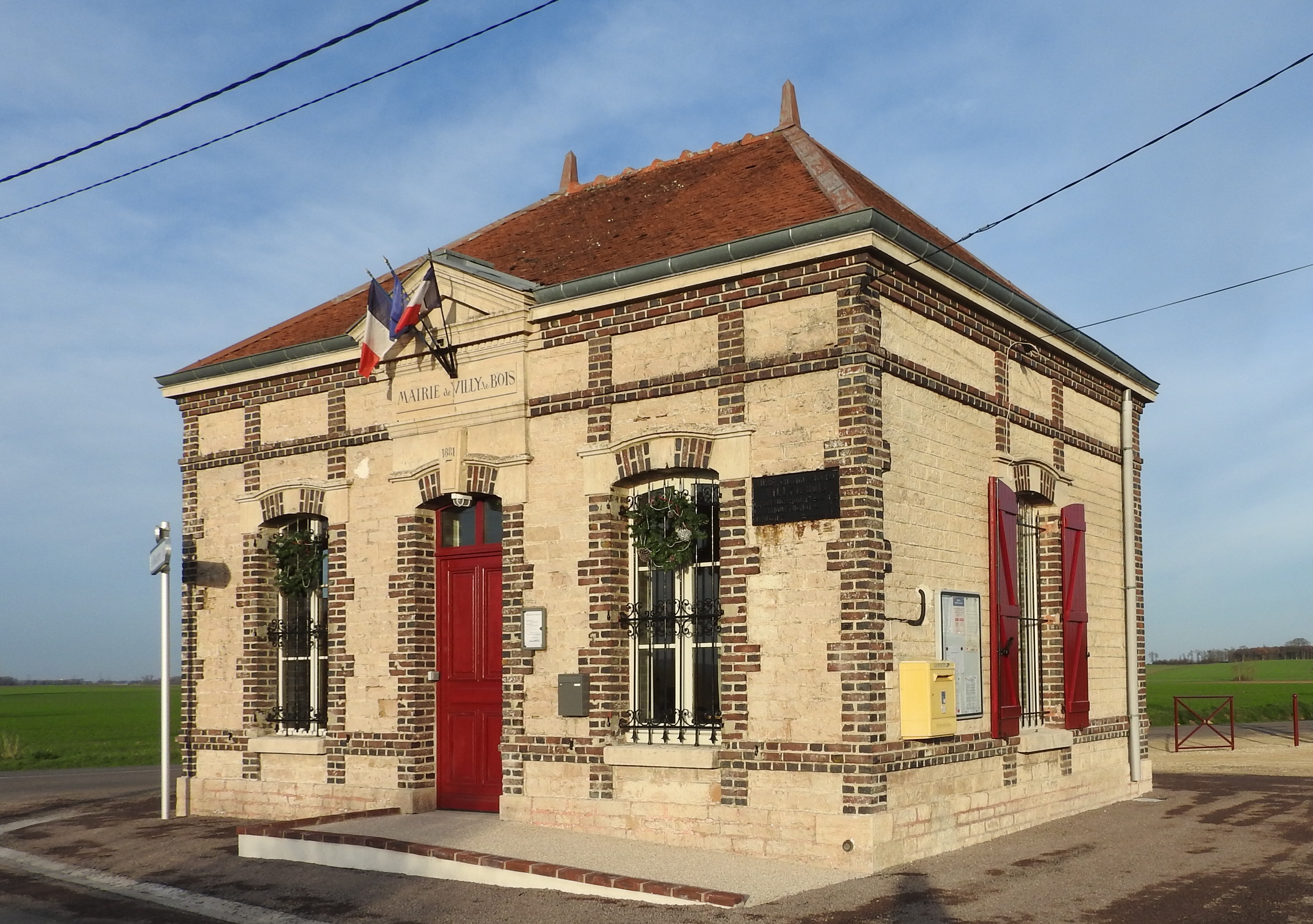 La mairie de Villy-le-Bois